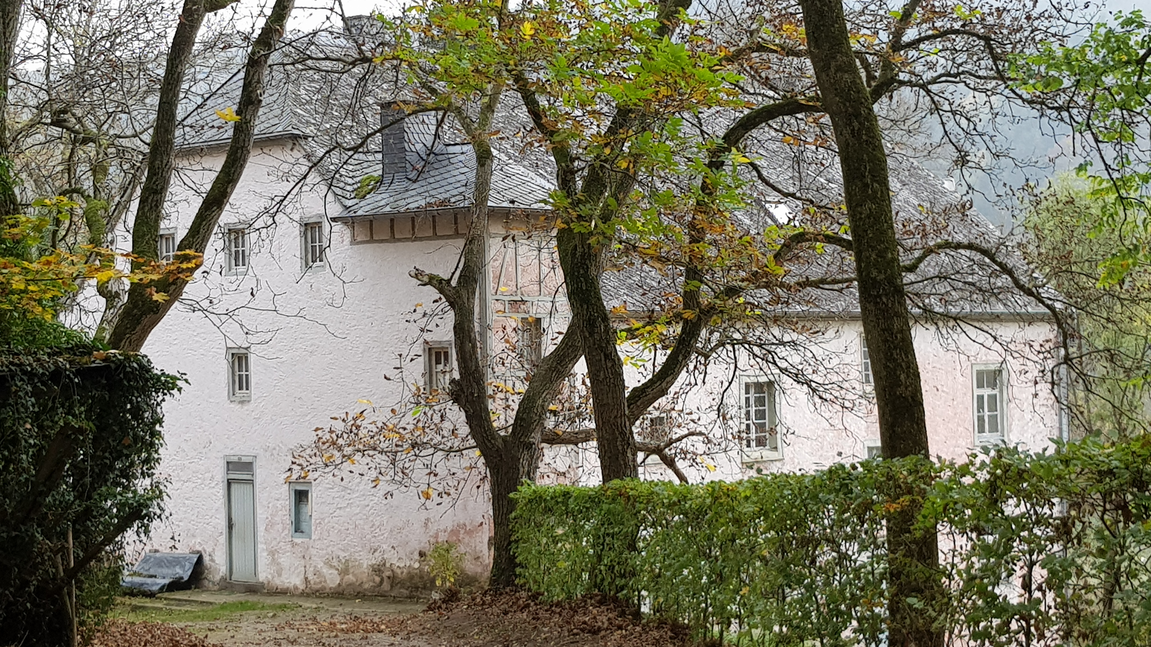 Schloss Oberhausen, Oberhausen, Burg-Reuland, Belgien This photo of immovable heritage has been taken in the Walloon Region